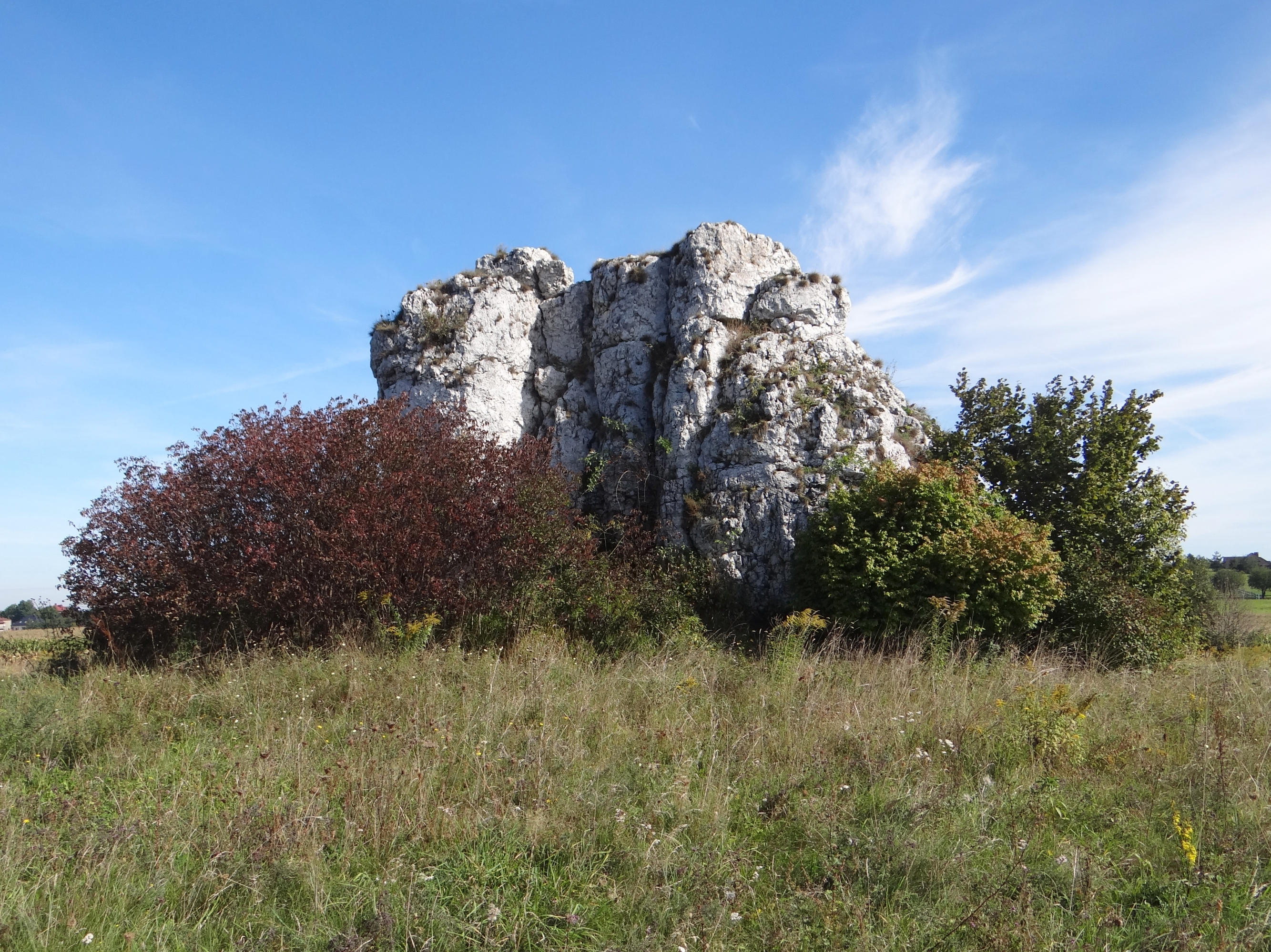 Polna Skałka - ostatnia na północ w grupie skał na wzgórzu 502 (Grodzisko) w Jerzmanowicach